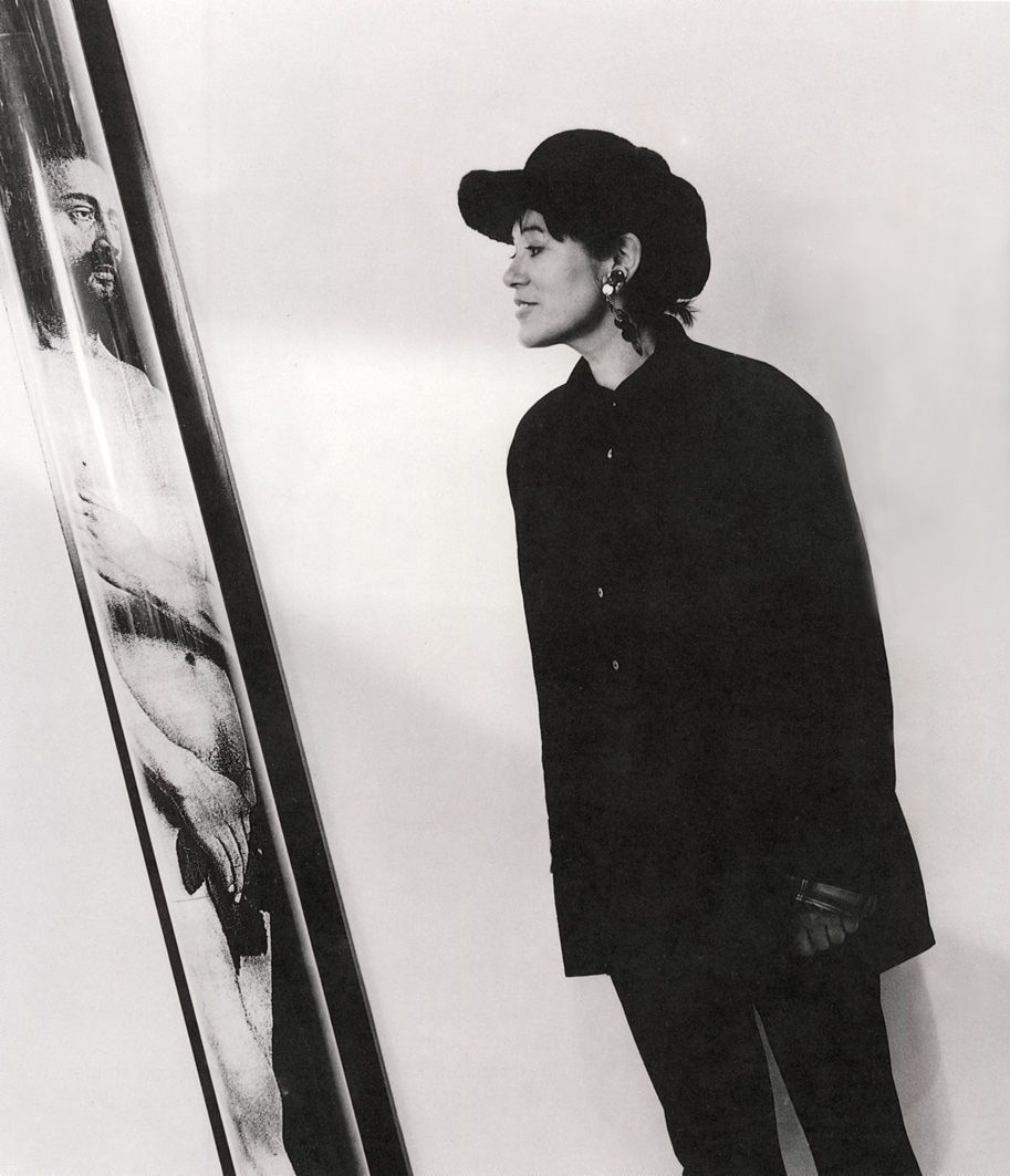 Paloma Navares en ARCO'92, Madrid.